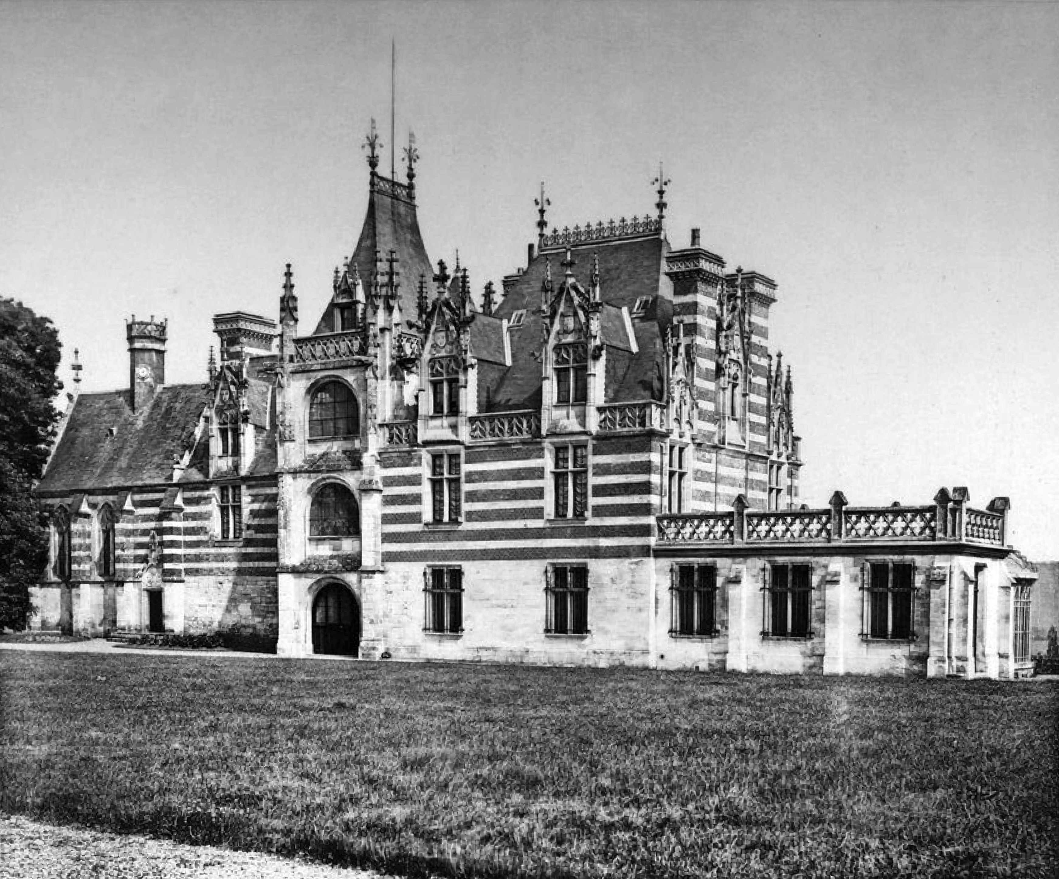 Schloss Ételan am Ende des 19. Jahrhunderts